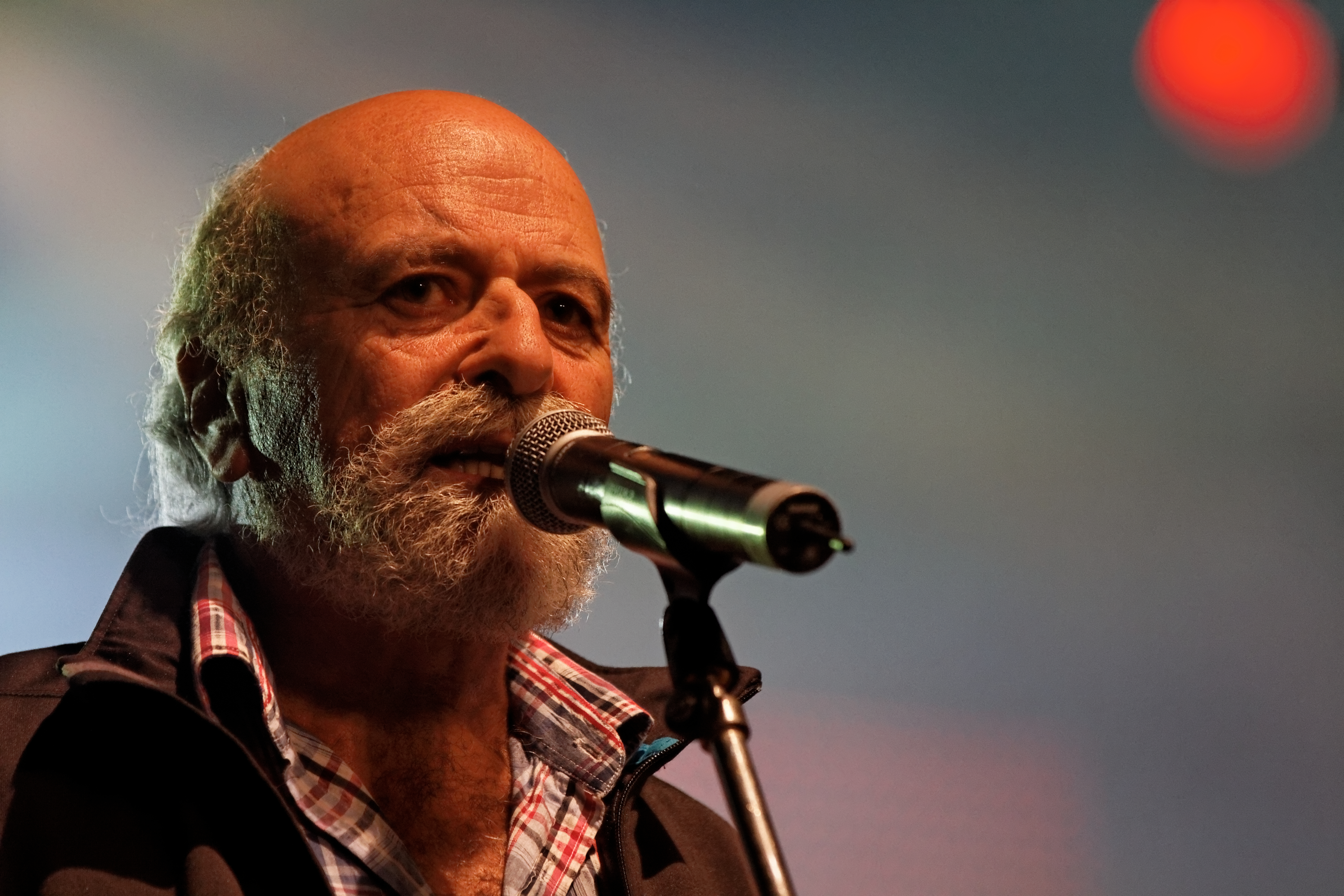 Les Sonerien Du fêtent leurs 40 ans en concert à l'espace Gradlon lors du festival de Cornouaille 2012.